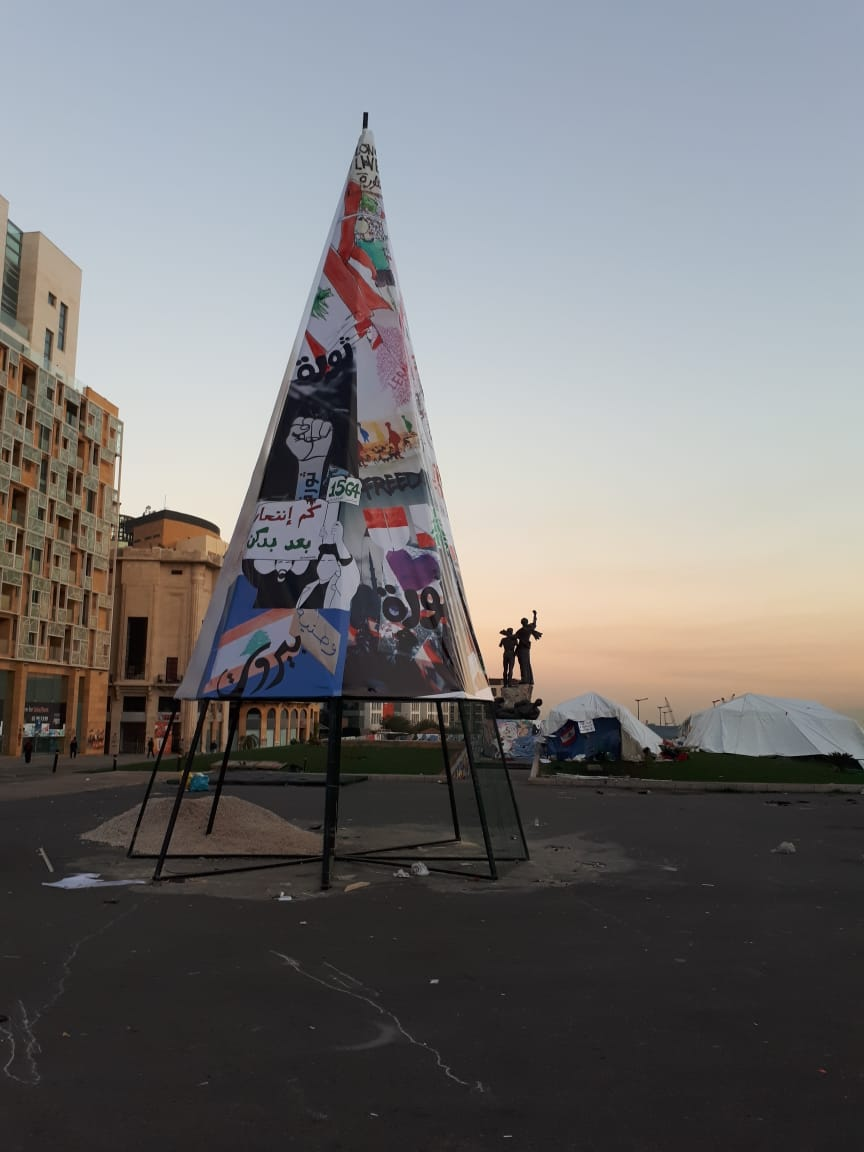 Installation in der Innenstadt von Beirut während der Proteste im Libanon